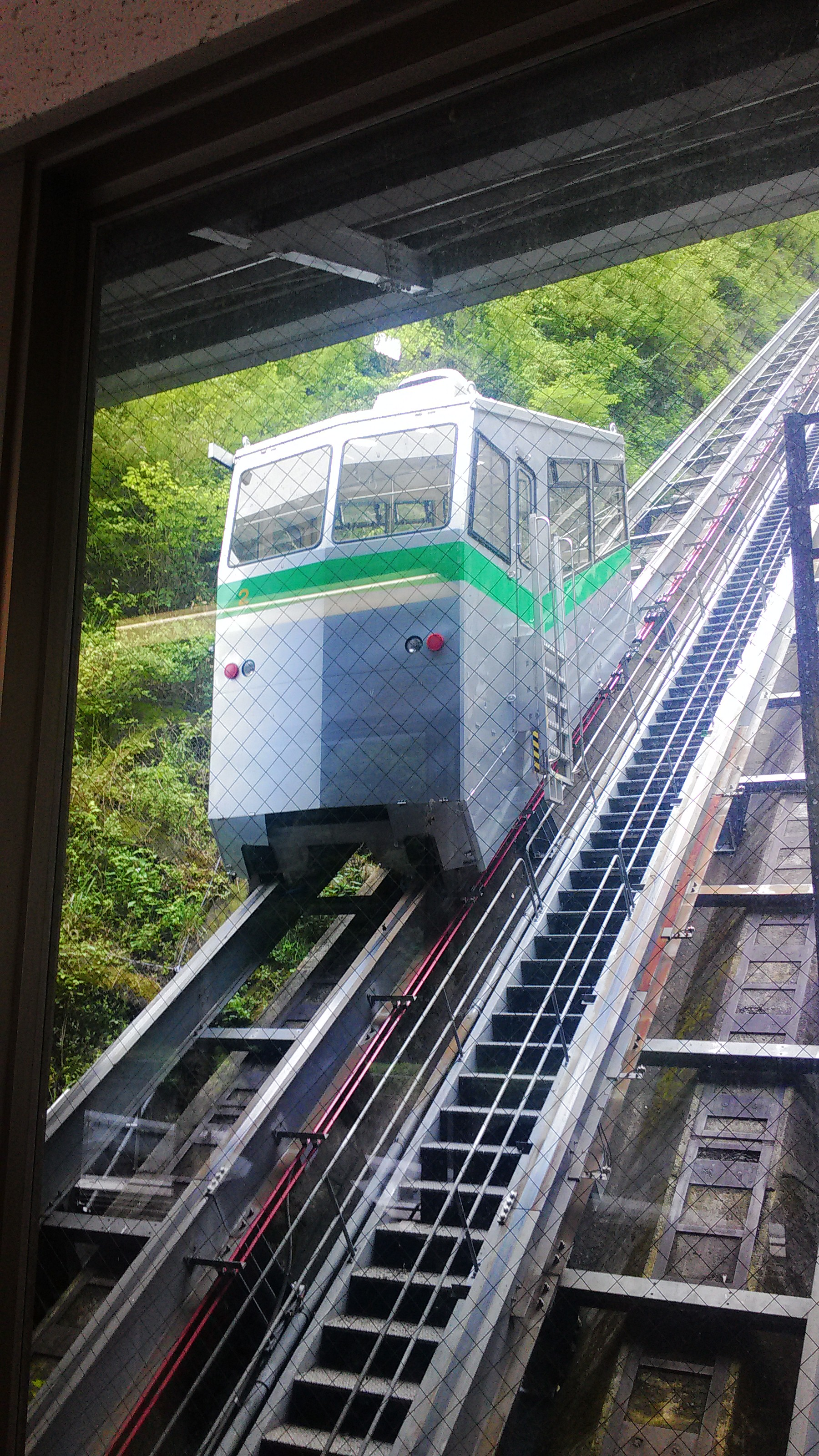 宮ヶ瀬ダムインクライン